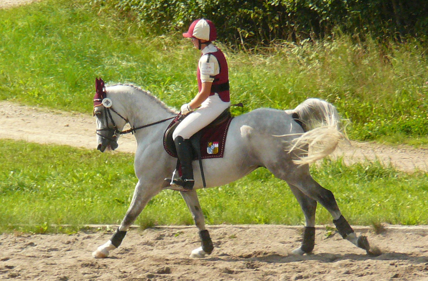 Un cheval shagya en compétition de concours complet